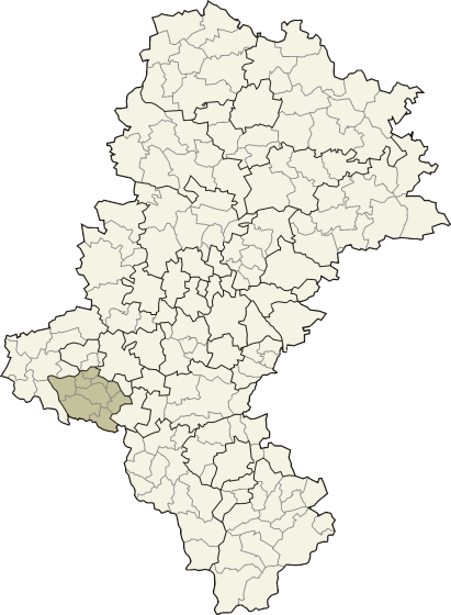 Powiat wodzisławski w województwie śląskim